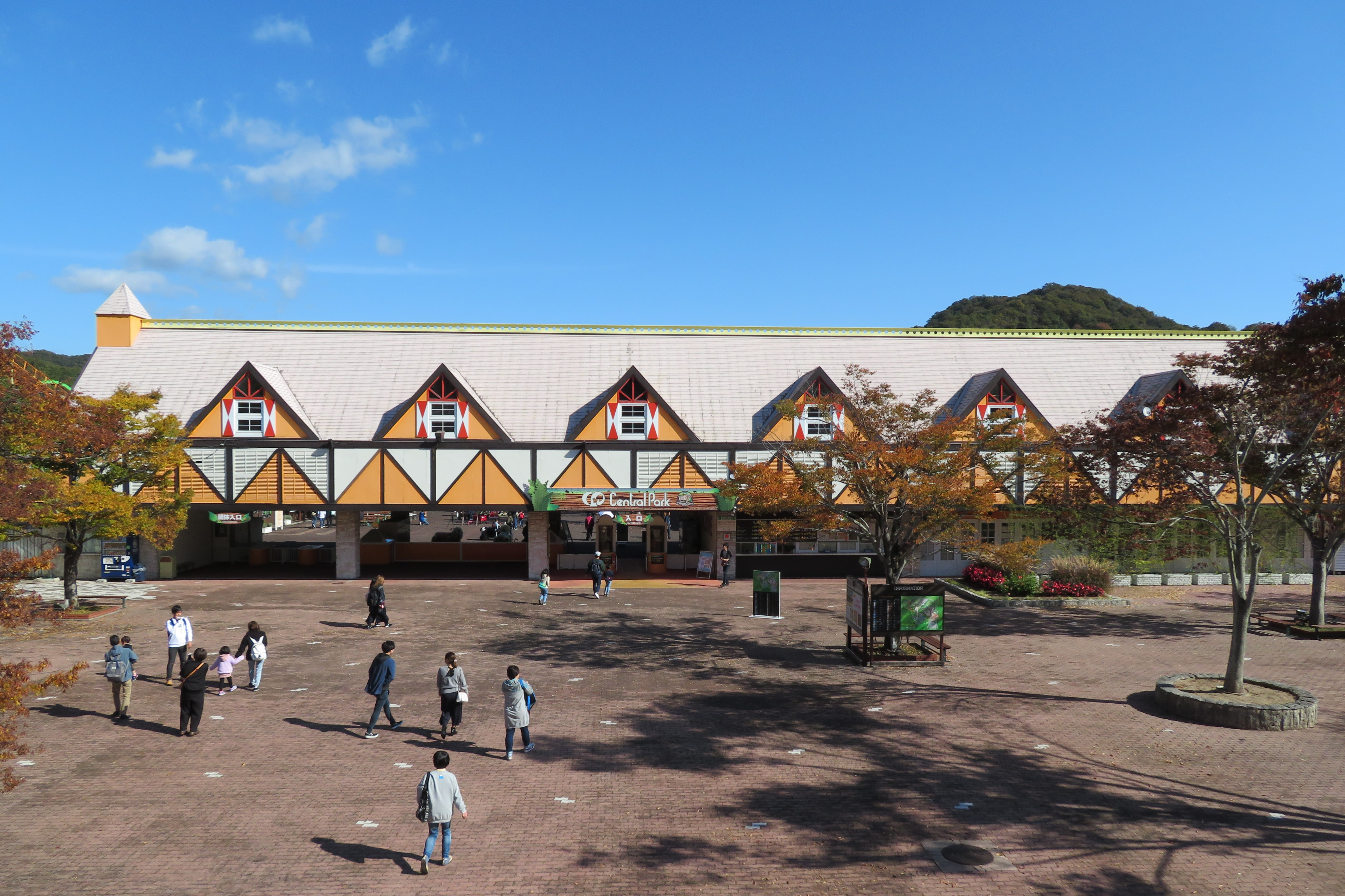 姫路セントラルパーク入口